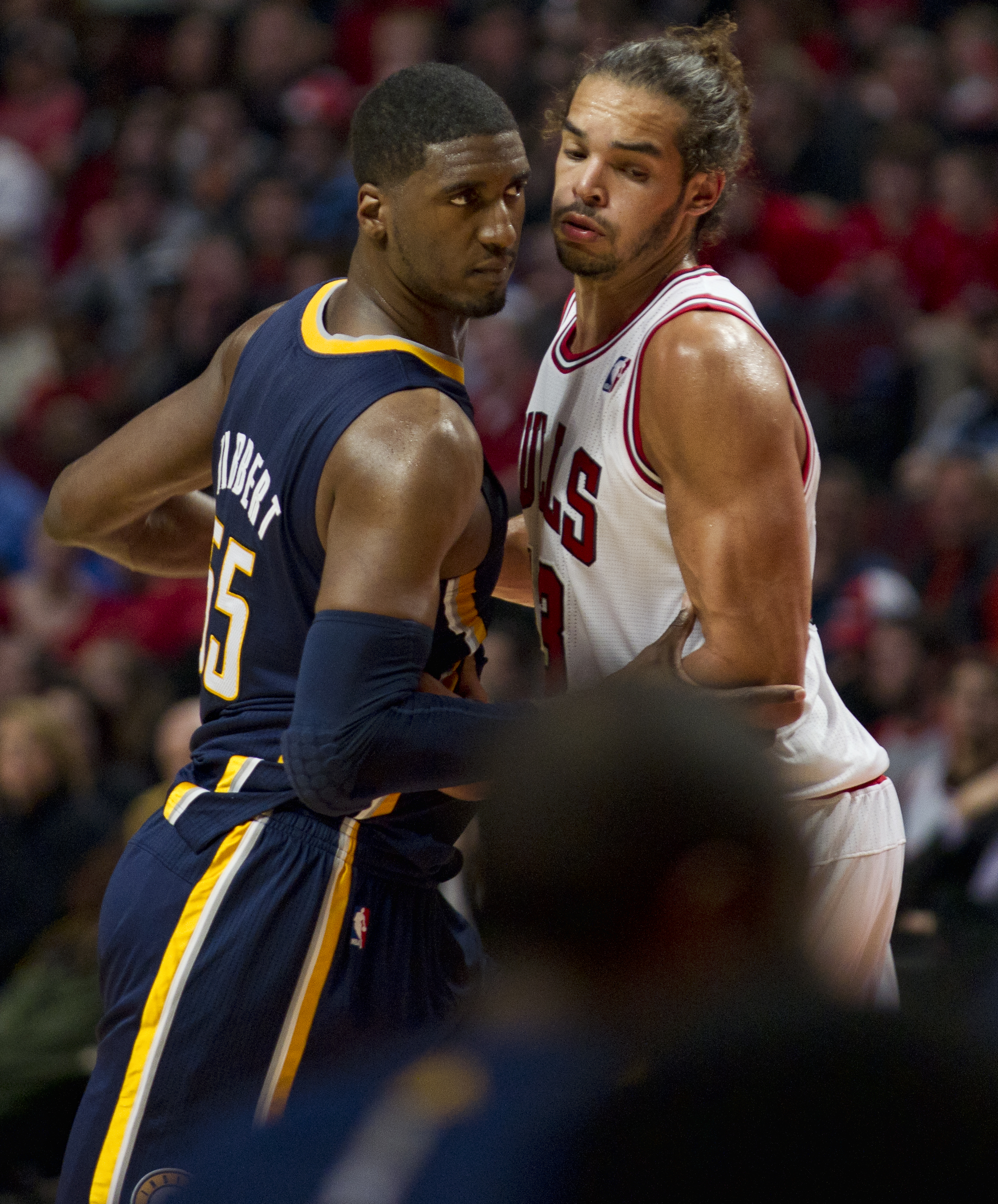 email me